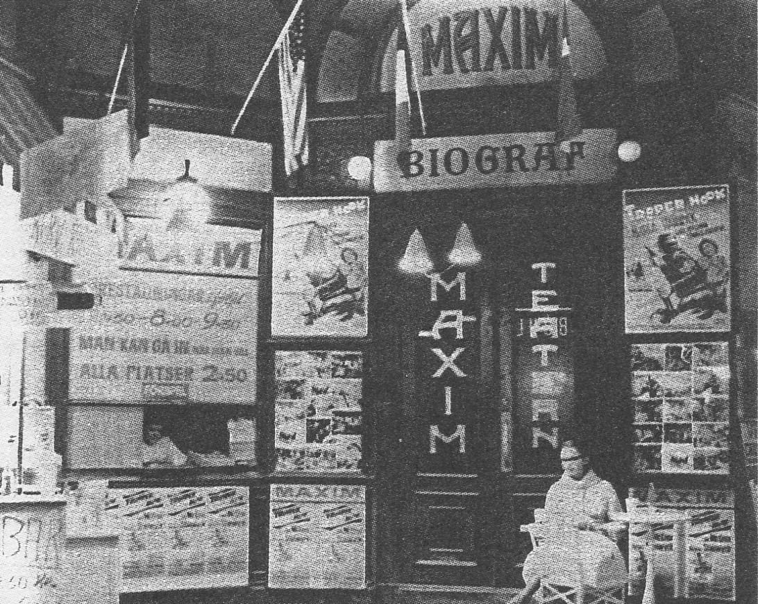 Biograf Maxim, Birger Jarlspassagen man ger Trooper Hook